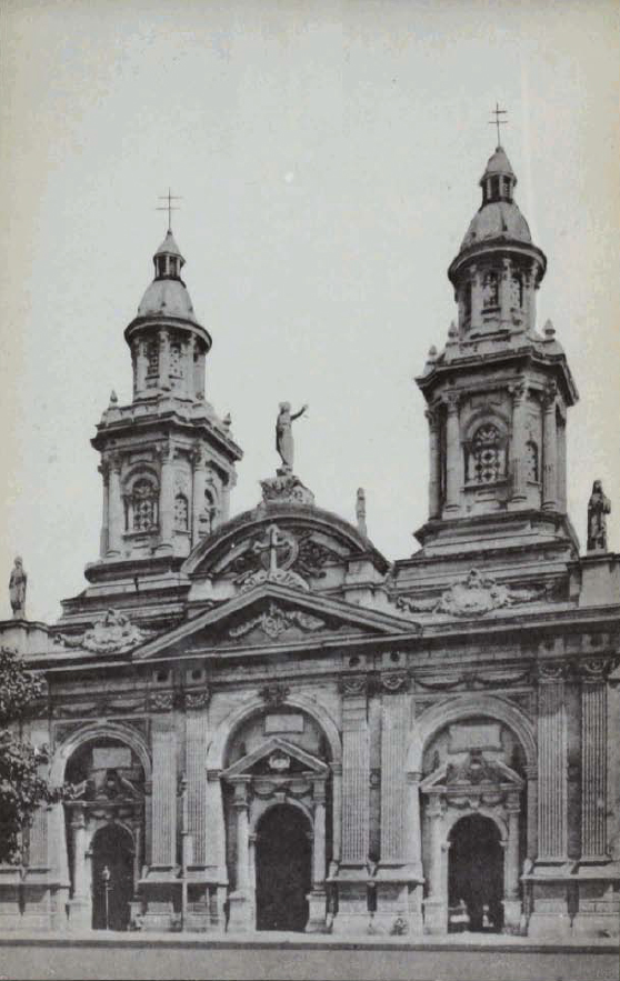 Catedral de Santiago de Chile en 1915.